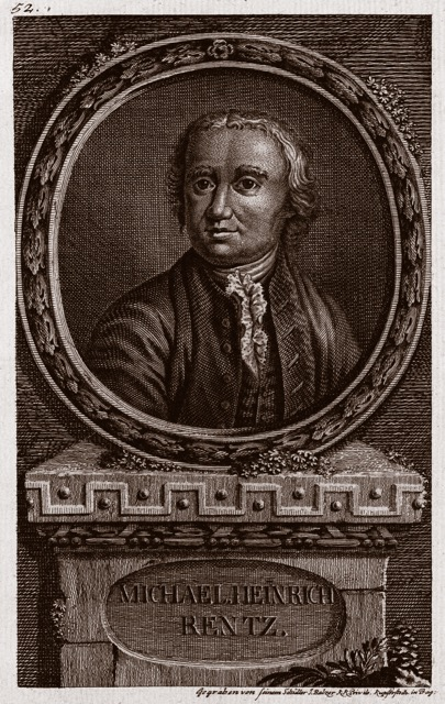 Jan Jiří Balzer: Michael Heinrich Rentz (kolem 1775)